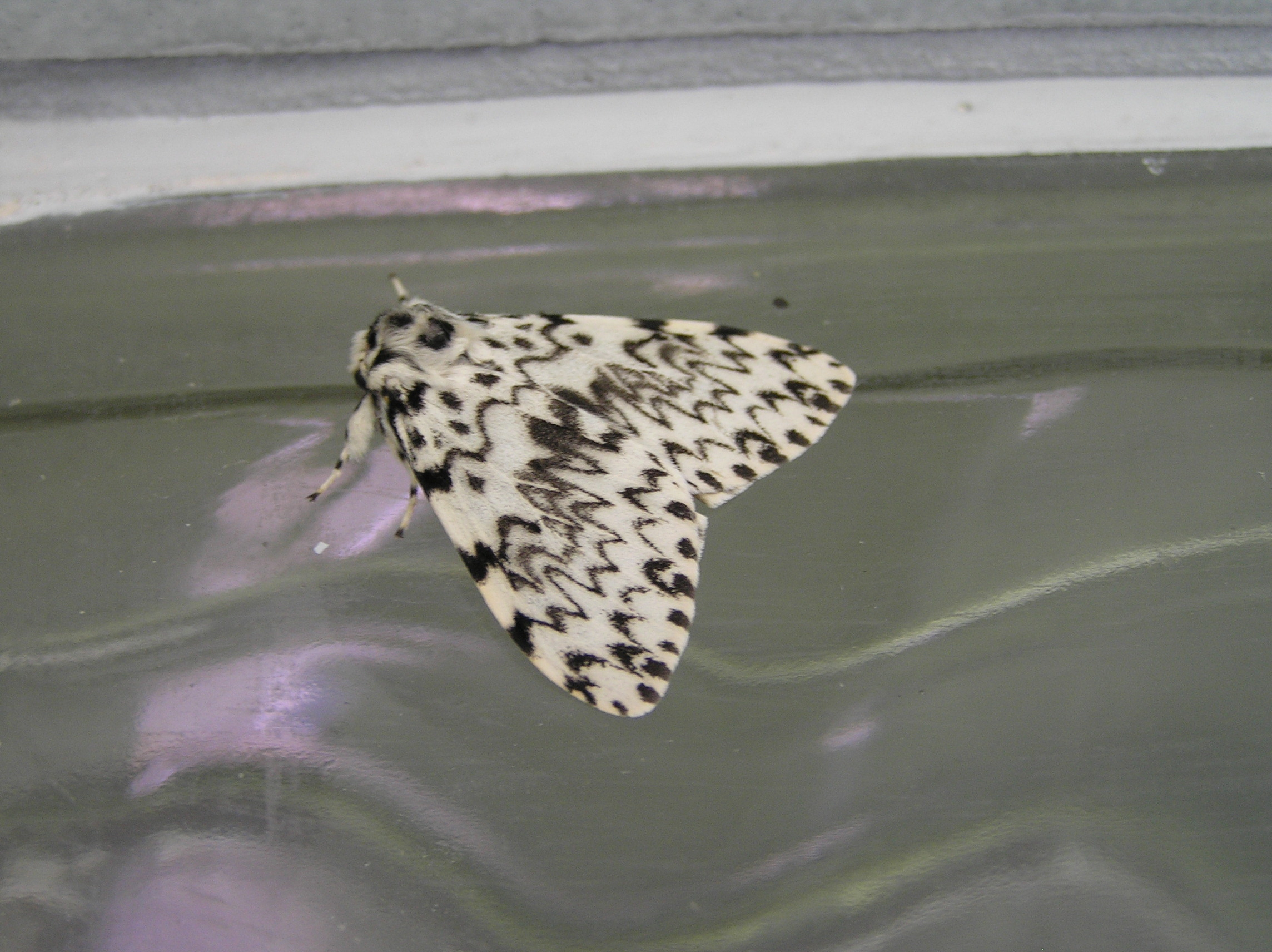 Lymantria monacha